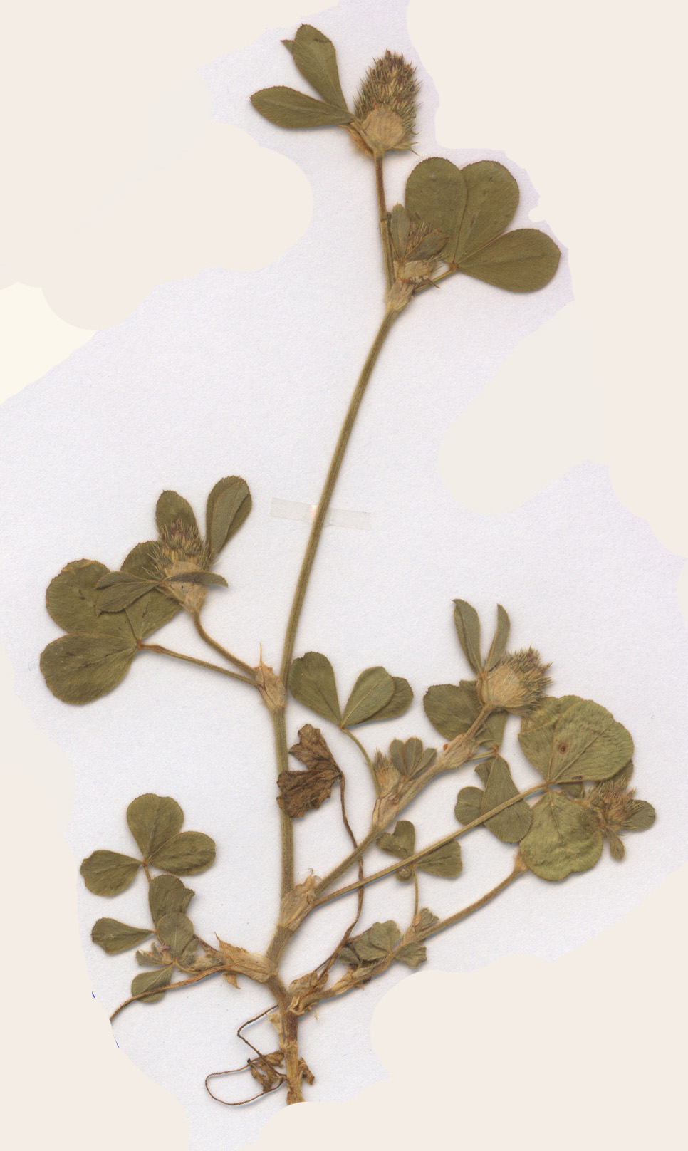 Trifolium striatum, eigener Herbarbeleg von 1985, Unterfranken